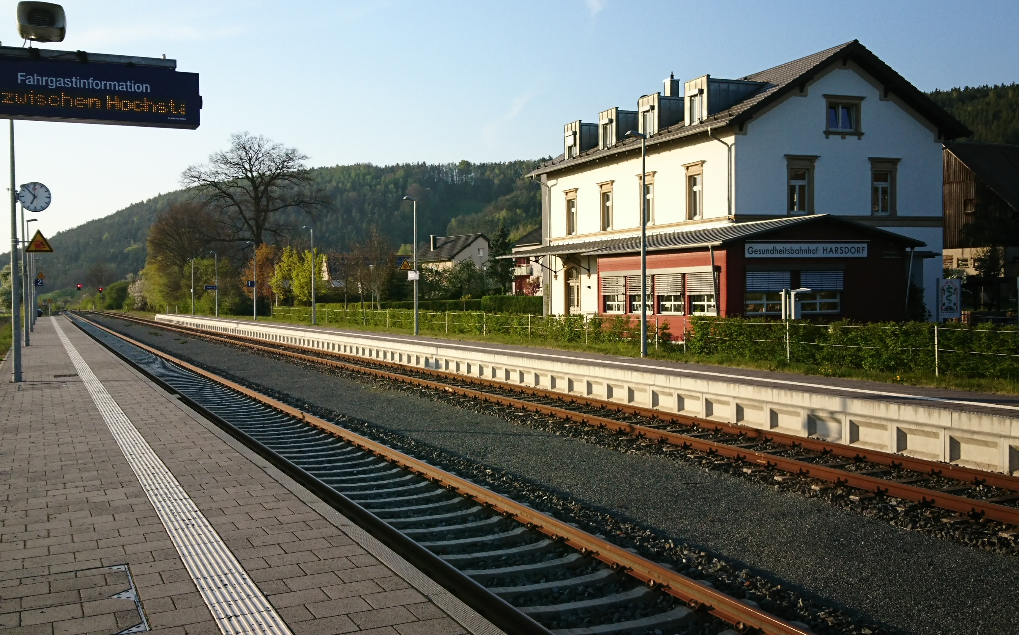 Gesundheitsbahnhof Harsdorf